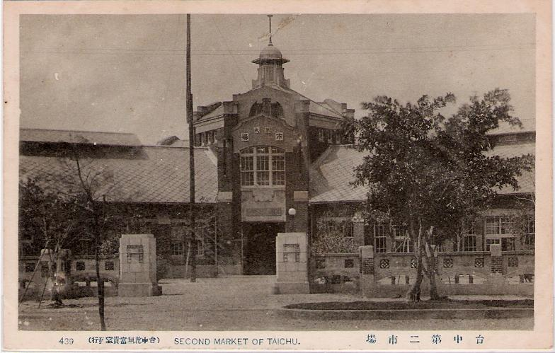 中文（台灣）: 日治時期的臺中第二市場。